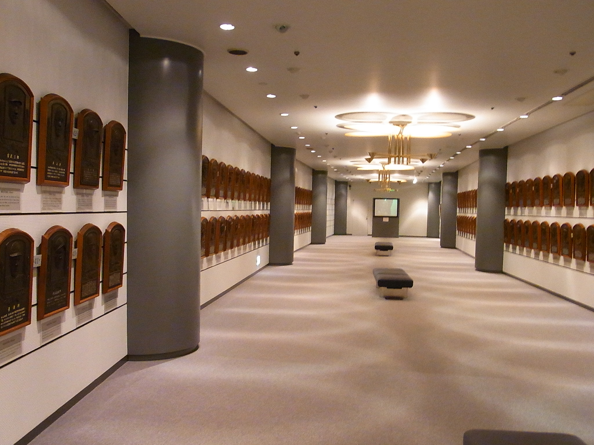 野球殿堂博物館